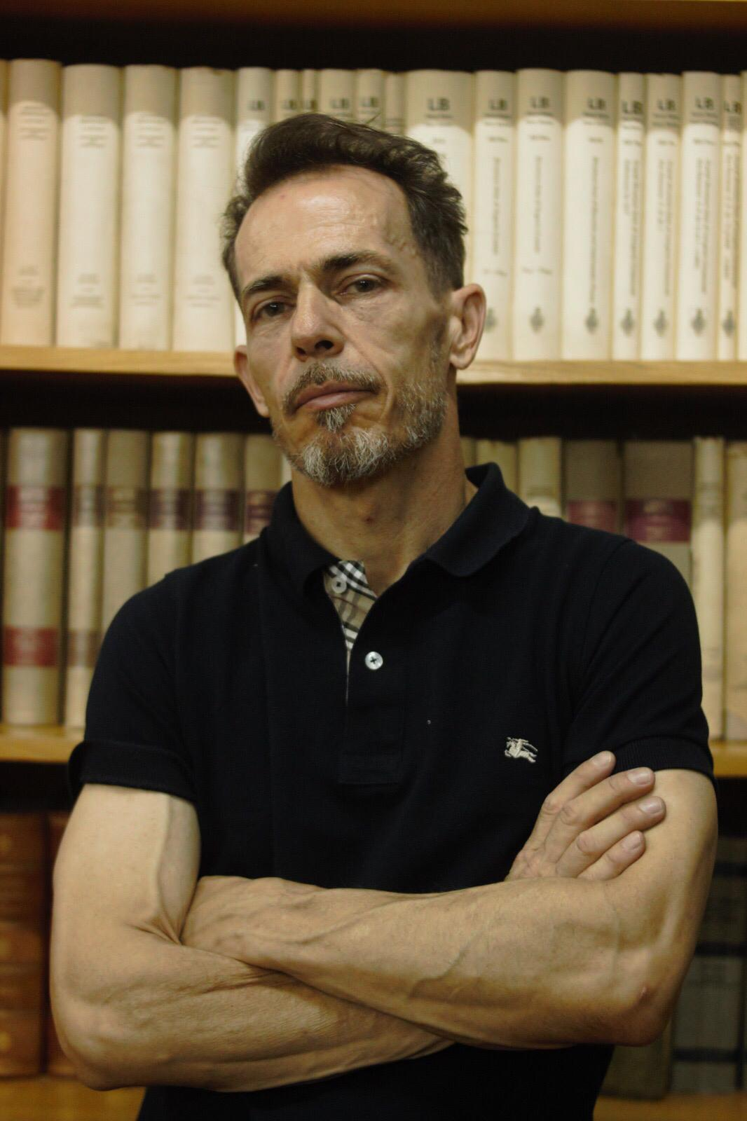 Snimljeno u biblioteci